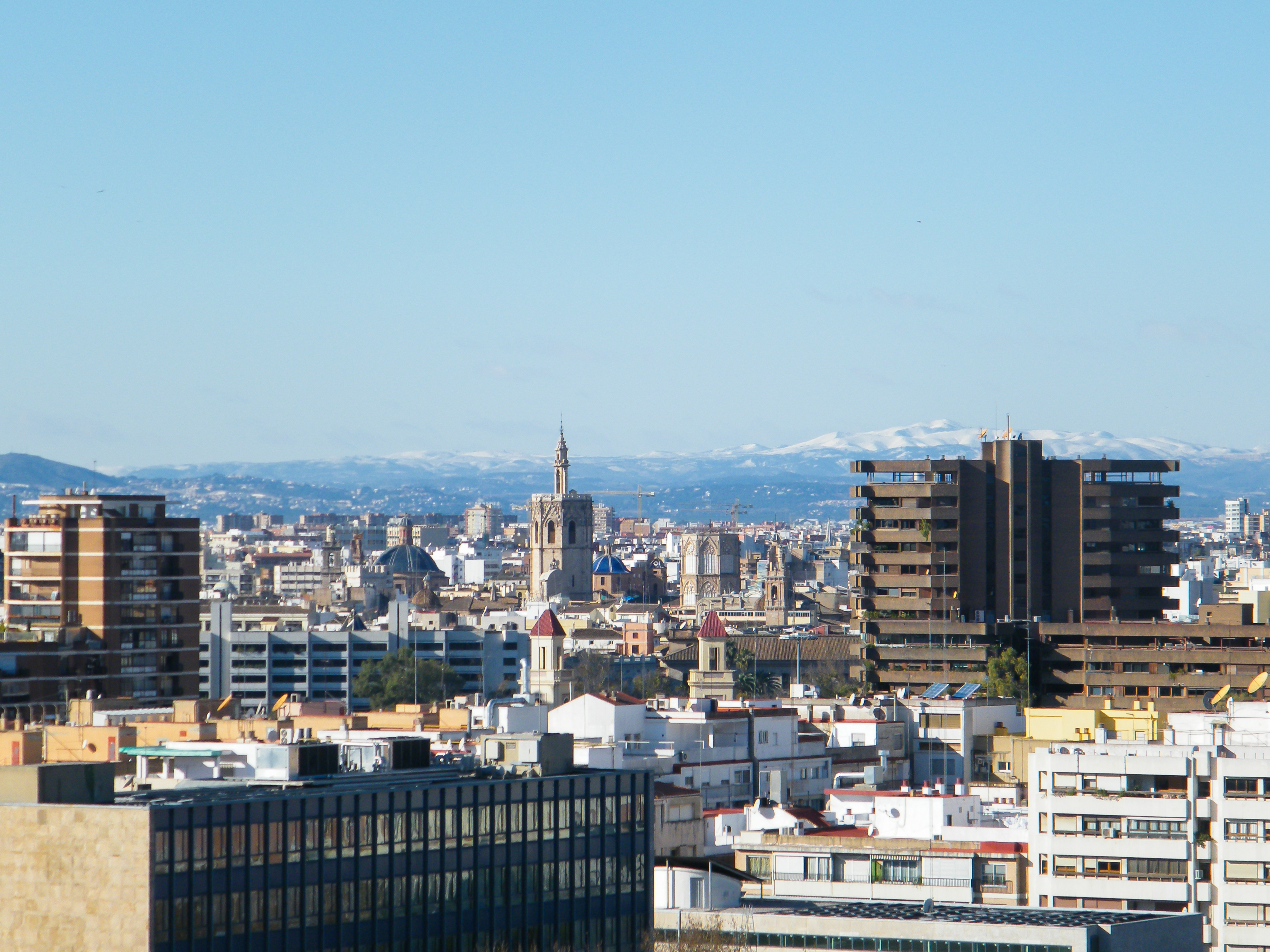 Vista de Valencia desde la calle Gascó Oliag, 6, de Valencia. En el horizonte se aprecian montes nevados situados al suroeste de Valencia.